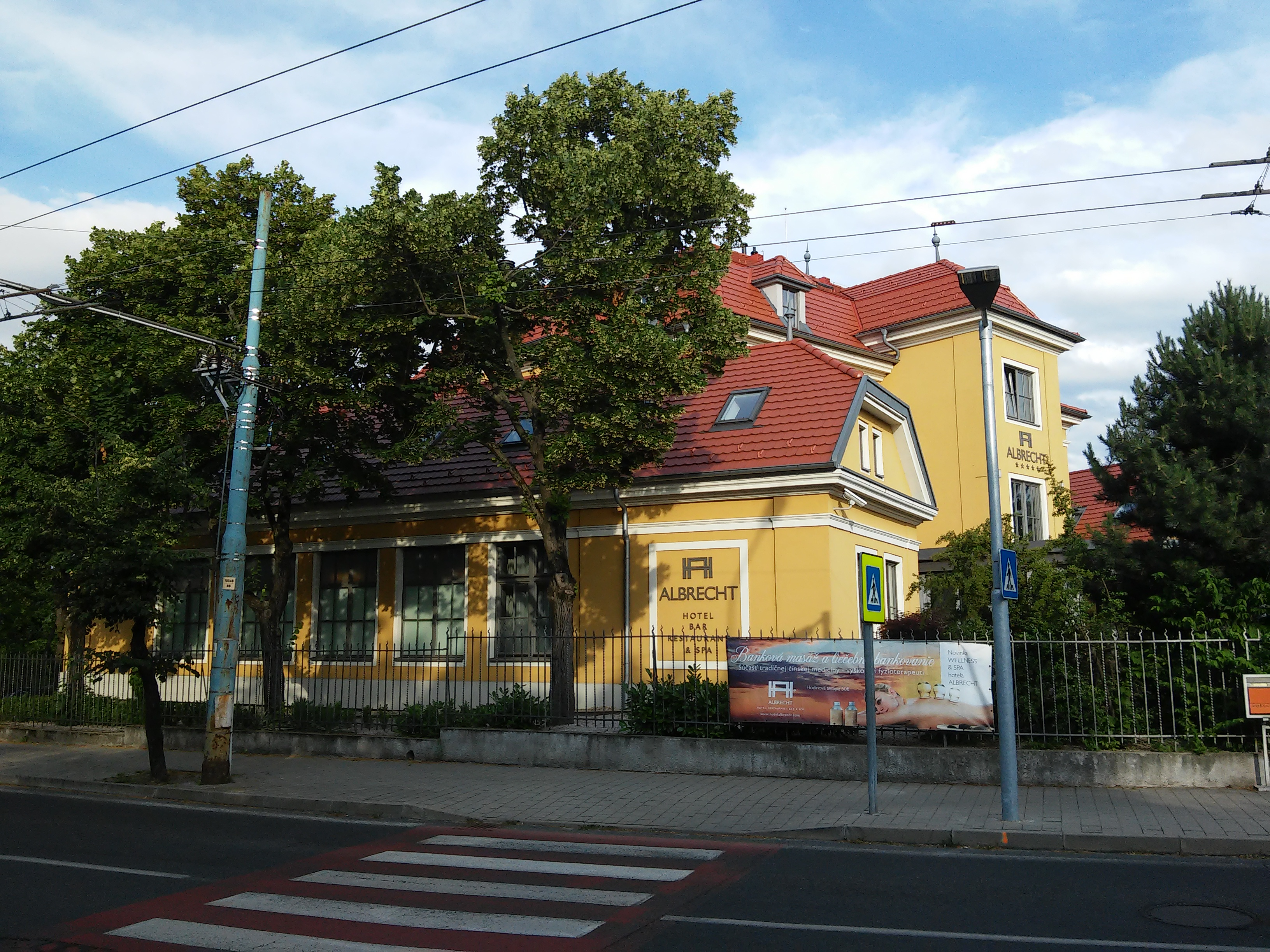 Hotel Albrecht, Mudroňova, Bratislava